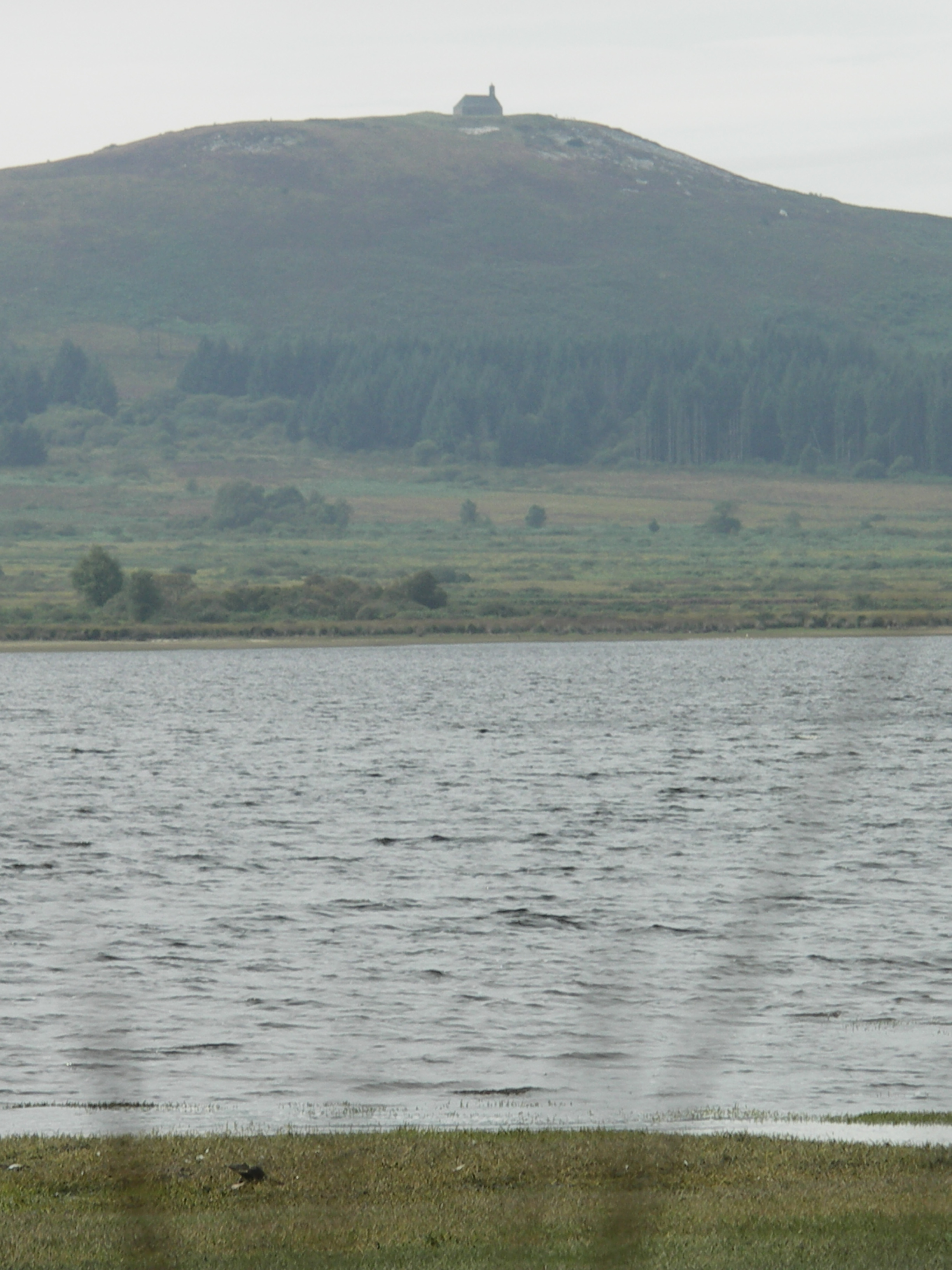 Le lac réservoir et la montagne Saint-Michel avec sa chapelle vus du Libitz en Botmeur